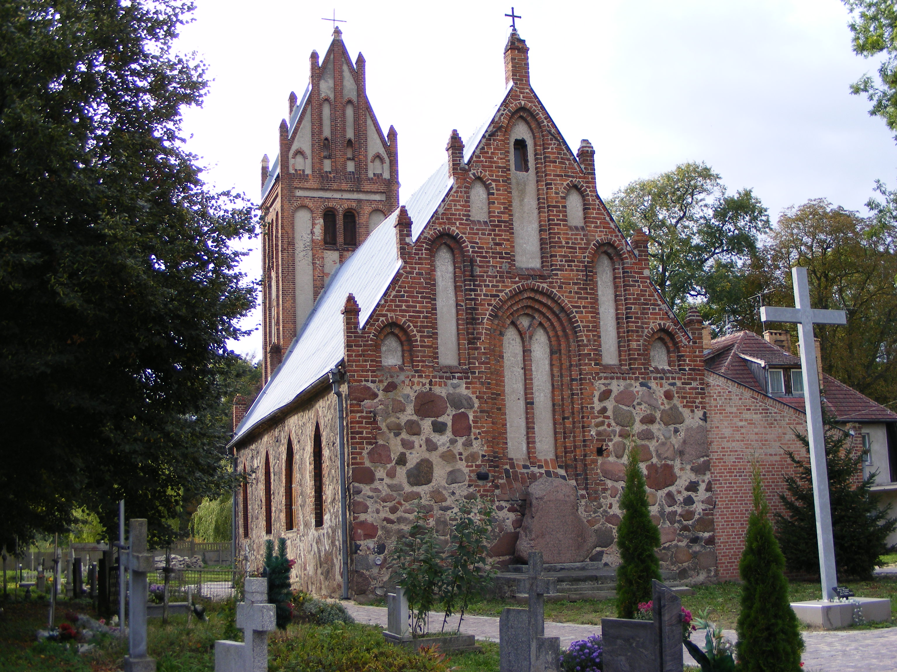 Kościół w Żabowie, gmina Pyrzyce, woj. zachodniopomorskie, Poland